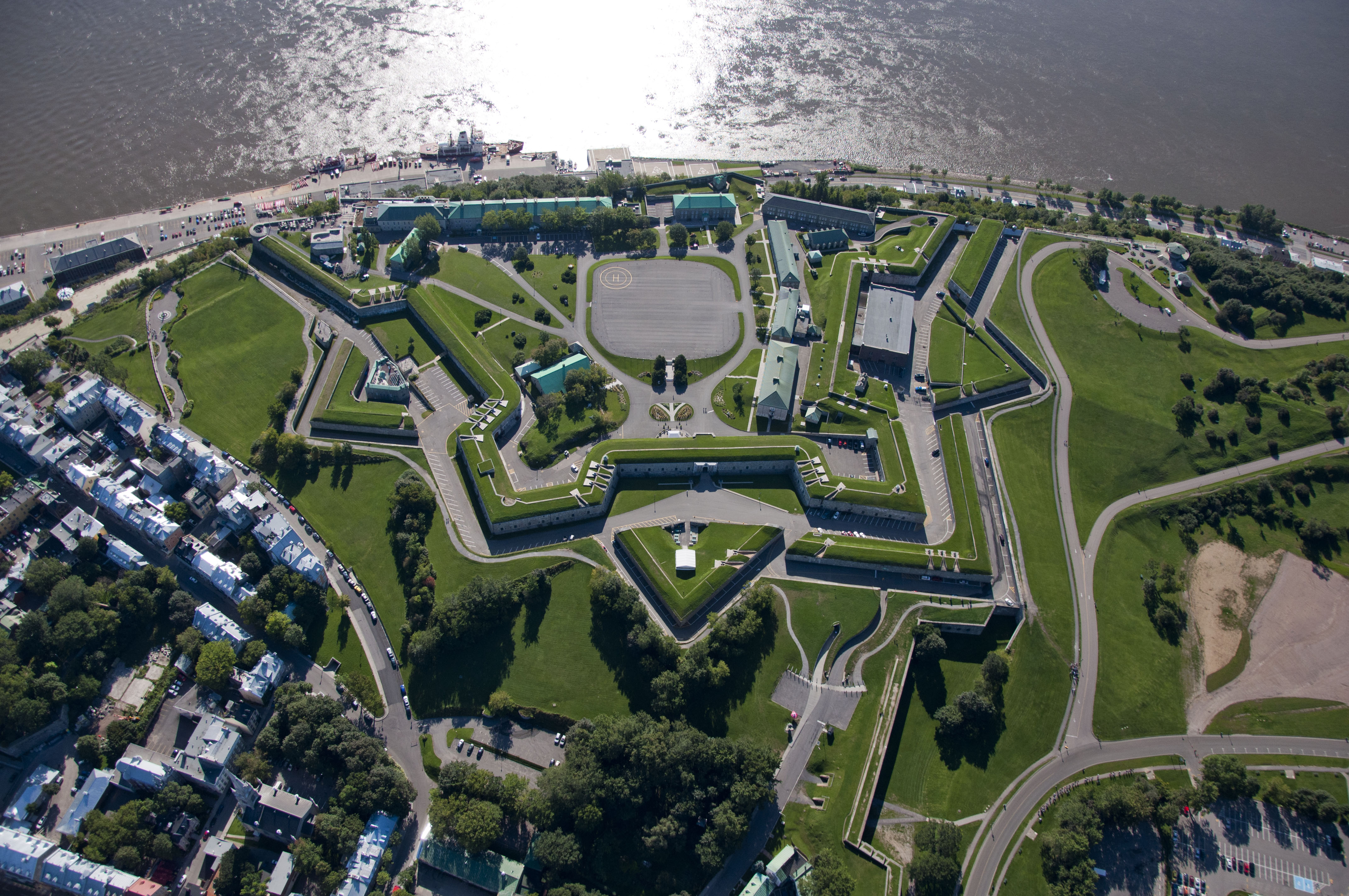 La Citadelle de Québec, vue du ciel.